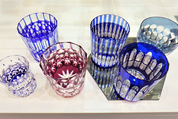 天満切子販売店で撮影したガラス商品です。 撮影者：Japanese Style Production 撮影日：2018/04 撮影場所：天満切子Gallery